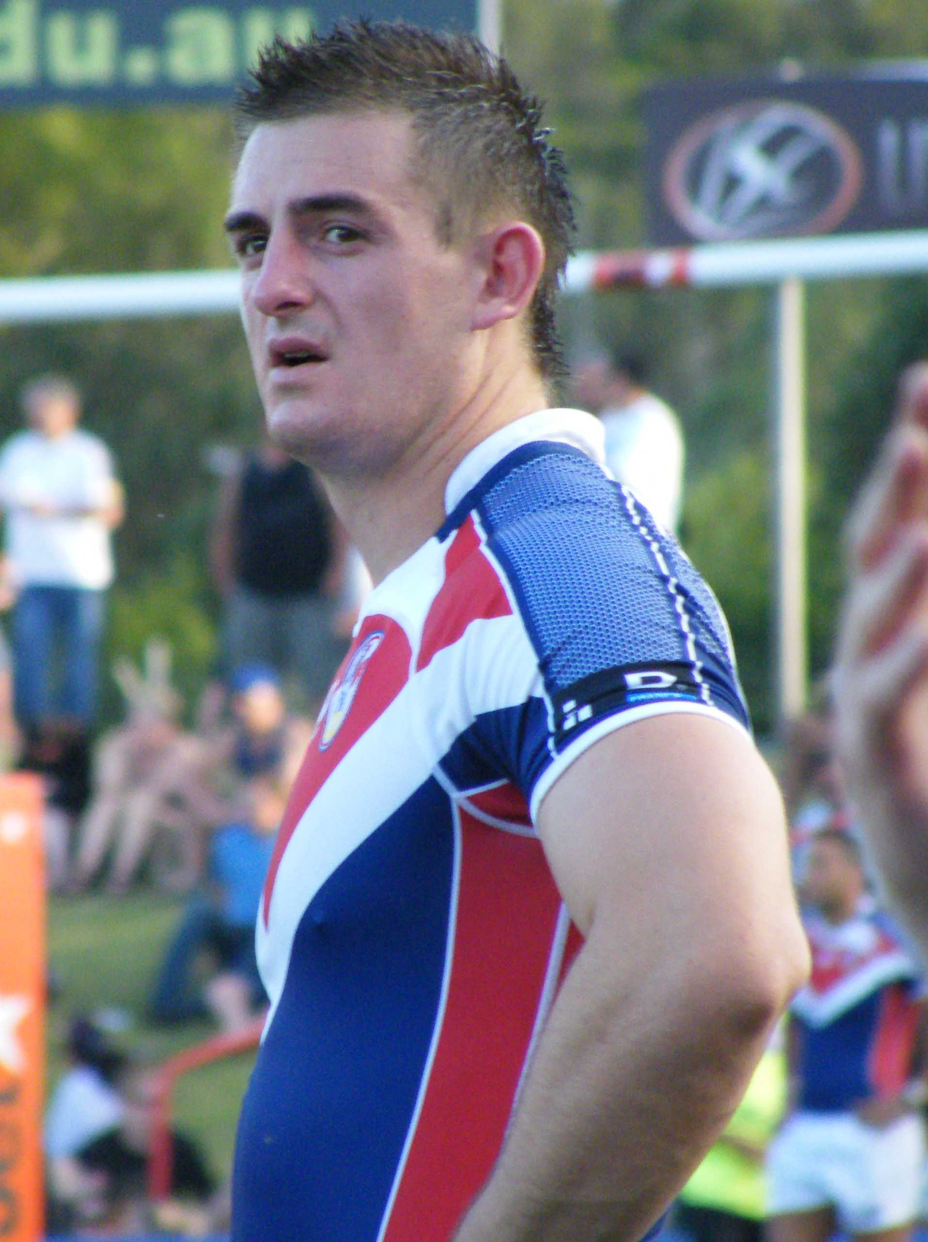 Teddy Sadaoui, joueur français de rugby à XIII sous le maillot de l'équipe de France.